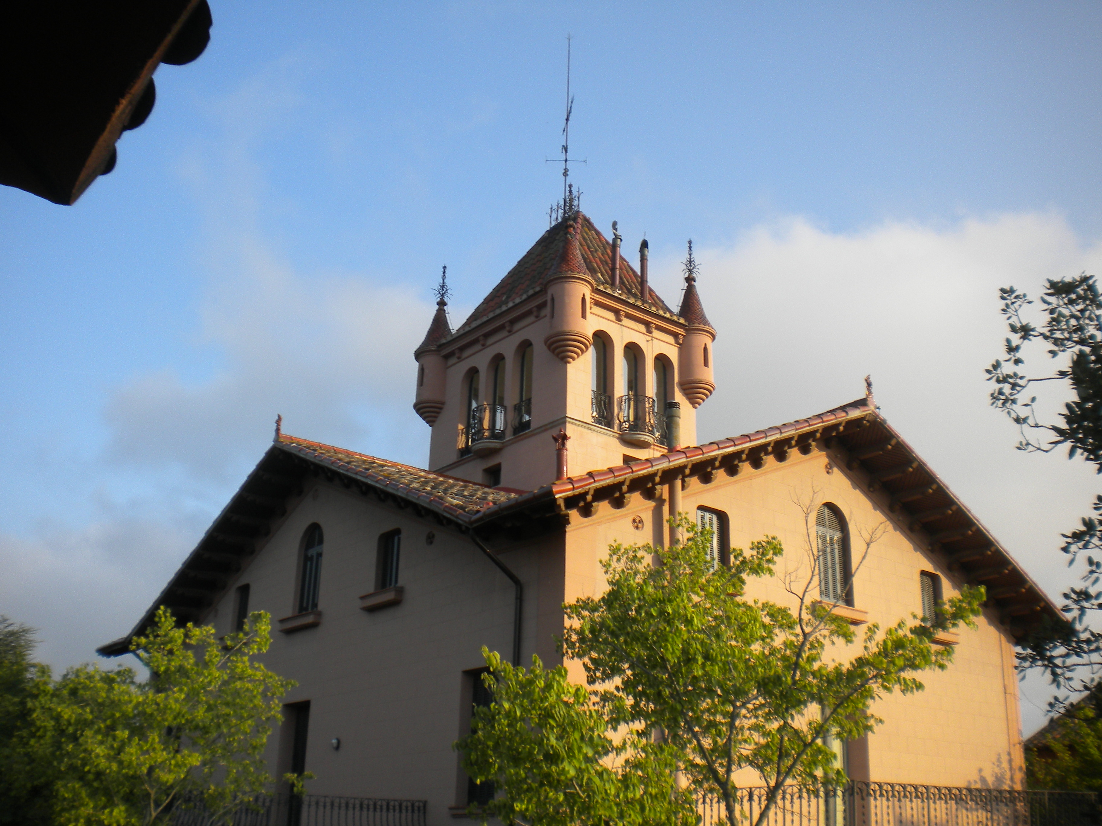 Casa modernista de Can Bordoi a Llinars del Vallès, Vallès Oriental.